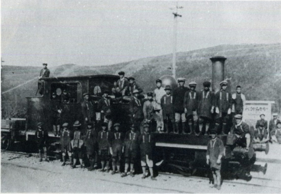 各務ヶ原駅まで開通当時の高山線工事関係者たち。各務ヶ原駅にて。